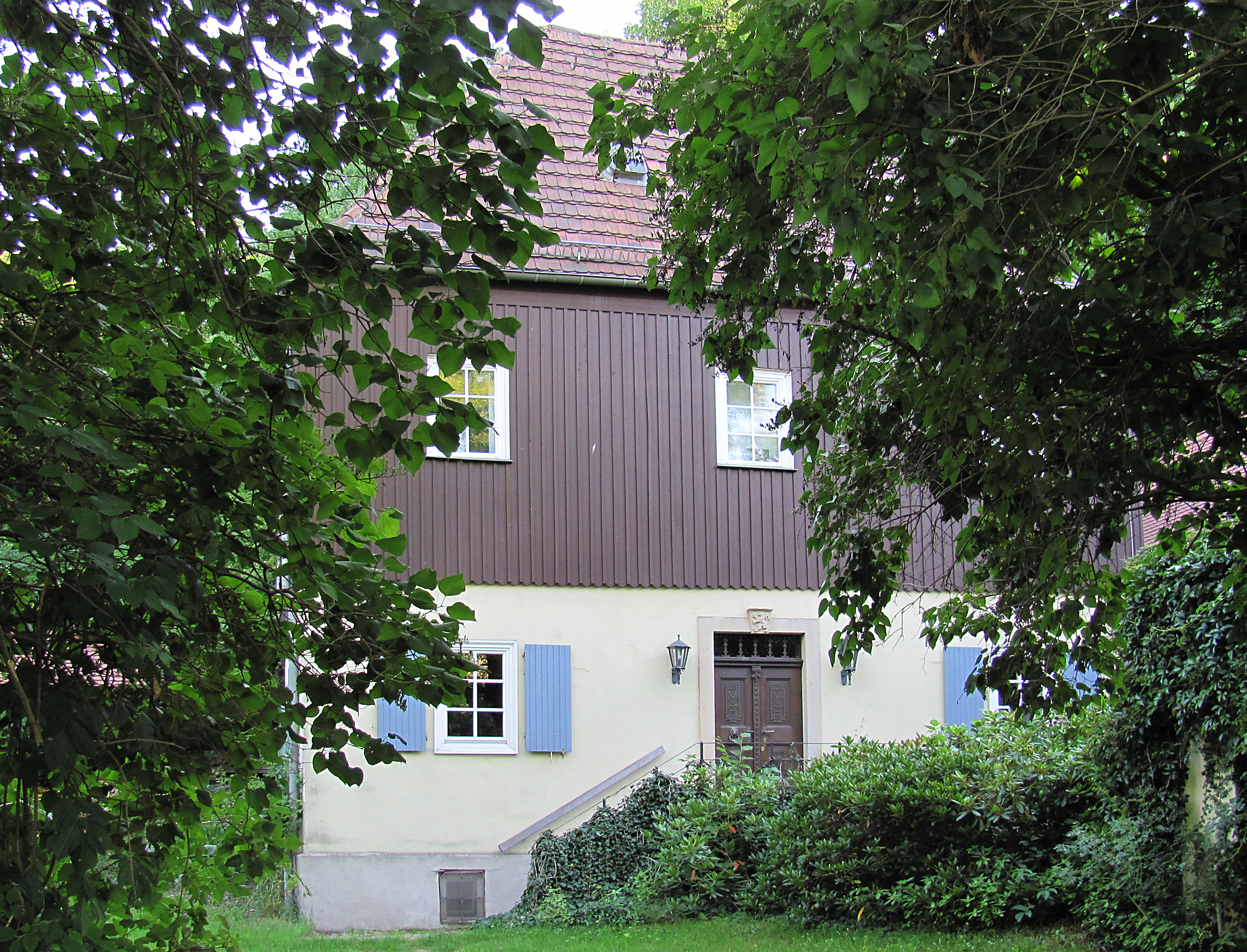 Radebeul, Haus Barnewitz, Eingangssituation